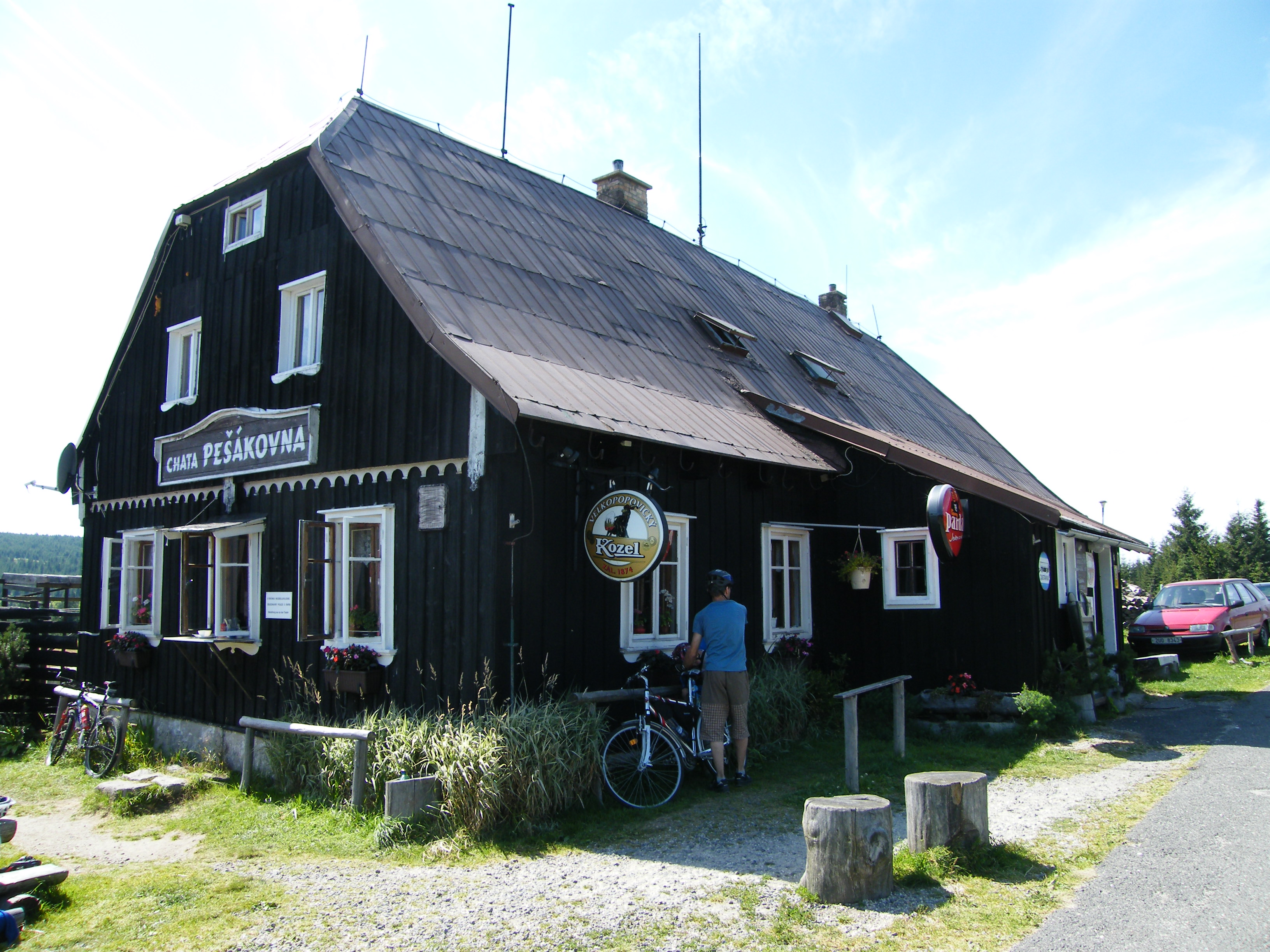 Chata Pešákovna v osadě Jizerka